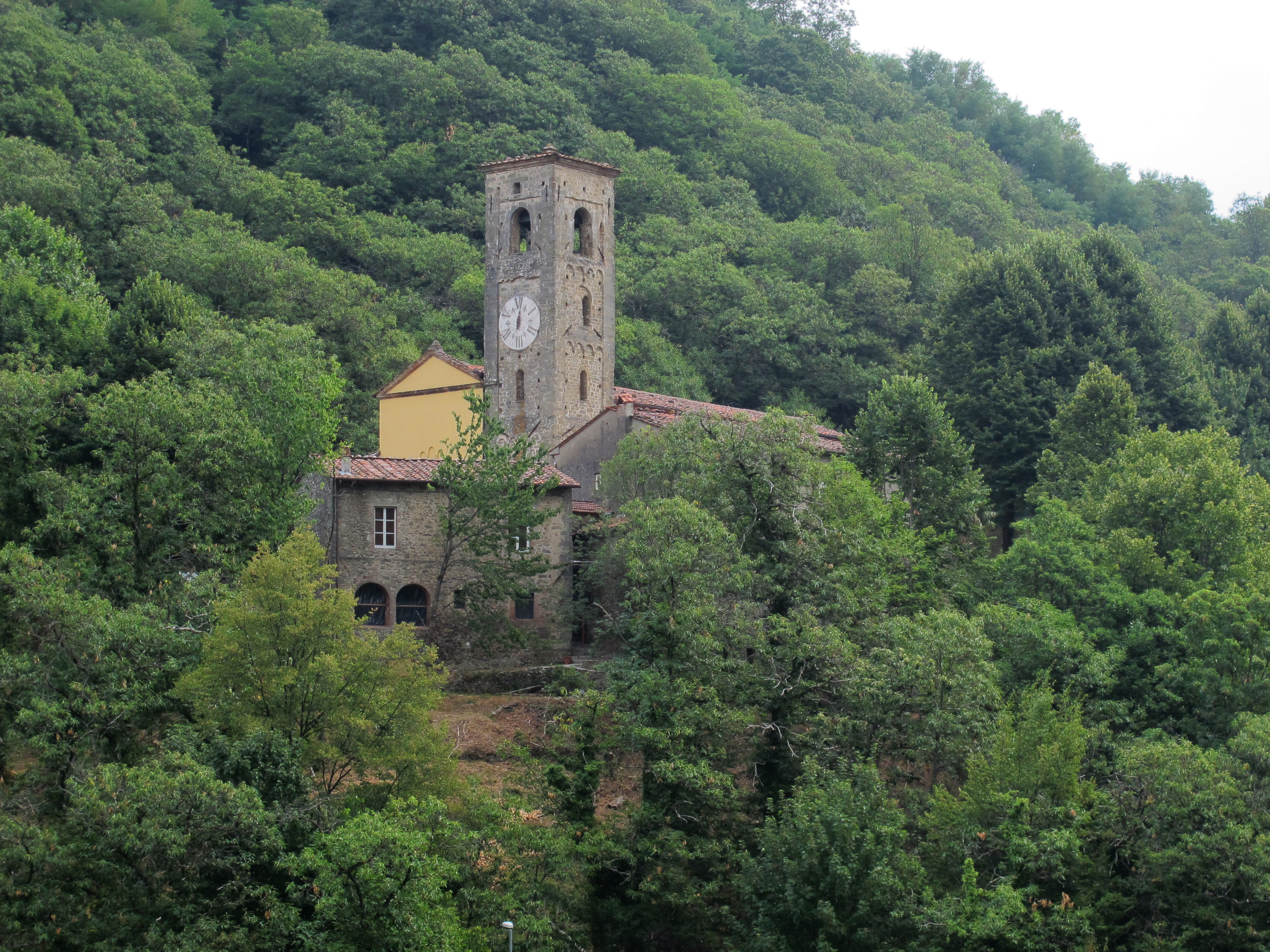 Pescaglia, SS. Pietro e Paolo apostoli